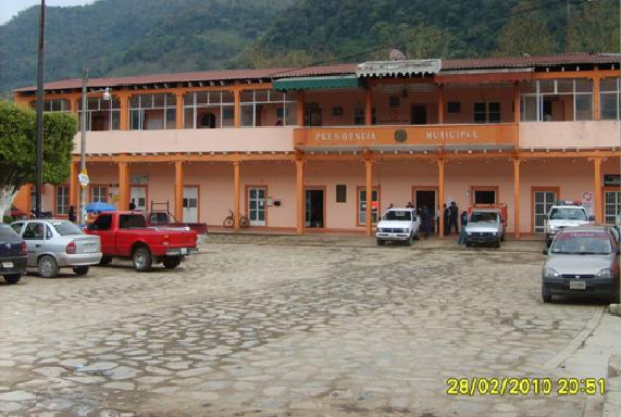 EDIFICIO EN CALNALI DE LA PRESIDENCIA 2010.JPG